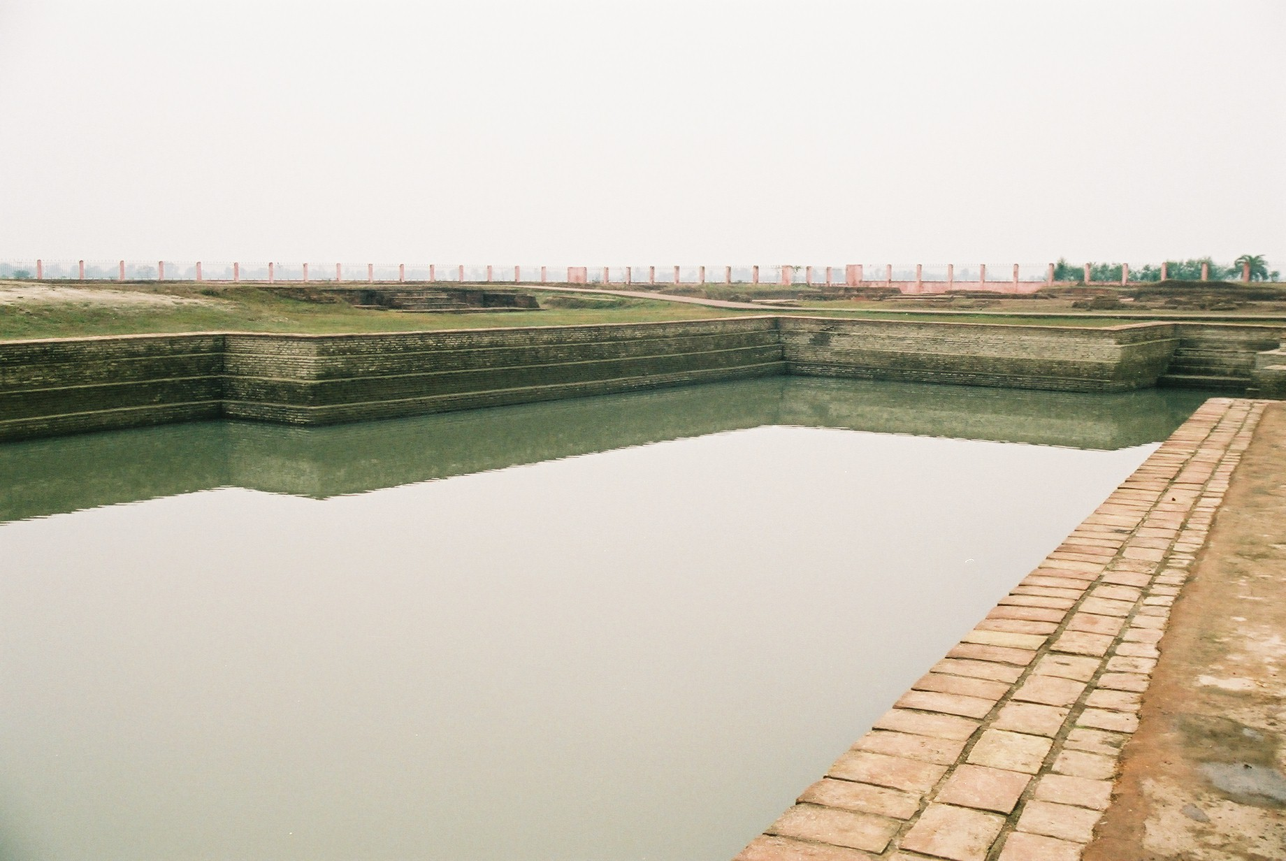 A few hundred metres from the Relic Stupa is Abhishek Pushkarini, the coronation tank. The sacred waters of the tank anointed the elected representatives of Vaishali. 猿の王様がお釈迦様のために掘ったと言われている沐浴池。 この猿の王様、マンゴーの蜜(ローヤルゼリーとの説も)をお釈迦様に献上するなど、なかなか熱心な佛教徒です。(笑) その他、このヴァイシャーリーは第２回の佛典結集が行われた場所であり、在家佛教の経典である維摩経の舞台でもあります。 お釈迦様も何度もこの街を訪れており、最後の旅もこの街を通ってクシーナガルへ向かいました。お釈迦様が入滅を決心された「寿命決定の地」として八大聖地の１つに数えられています。 (2005/01/24 Vaishali, Bihar, INDIA)